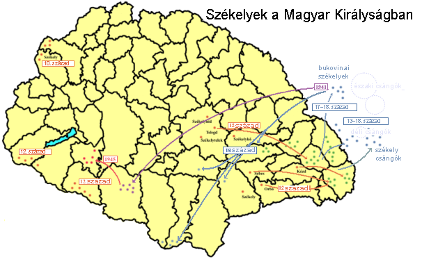 Székelyek a Magyar Királyságban